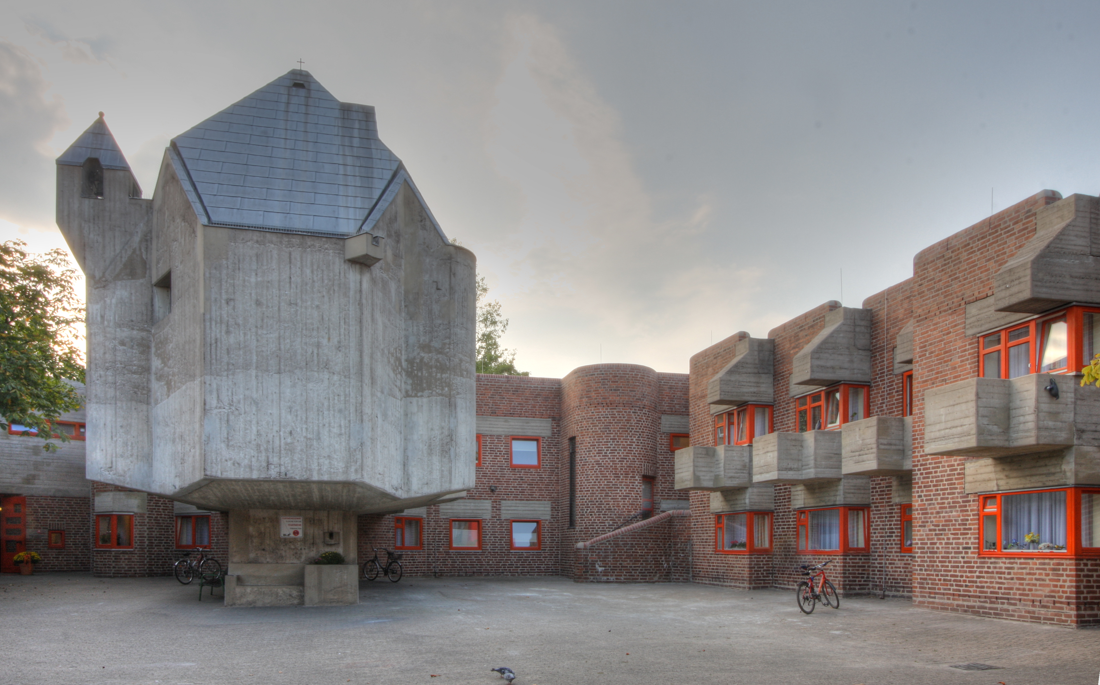 Altenwohnheim St. Hildegardis und Kirche St. Matthäus in Düsseldorf-Garath, Architekt: Gottfried BÖhm